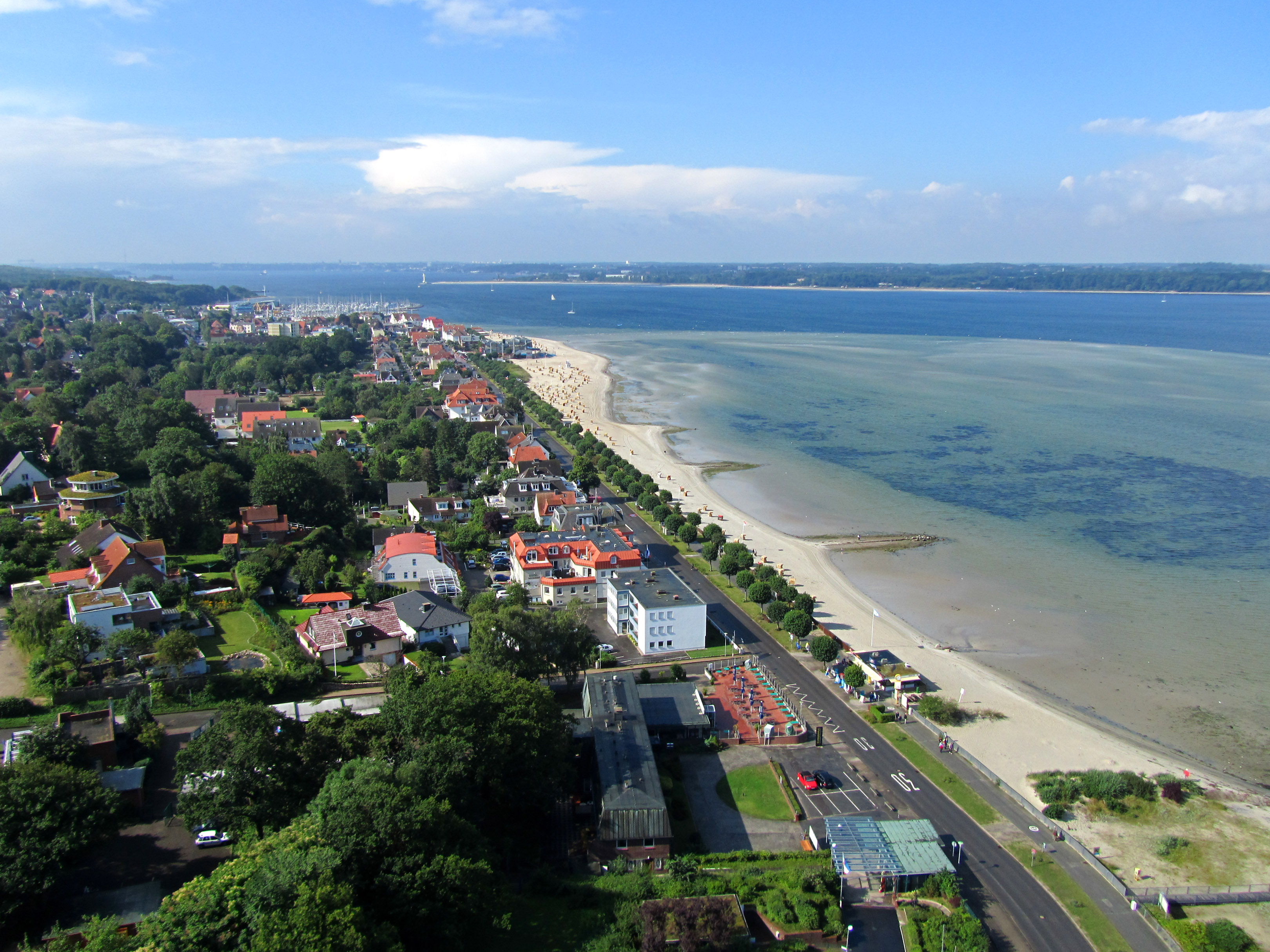 Blick vom Marineehrenmal Richtung Westen. Im Vordergrund befindet sich Laboe, auf der anderen Seite der Kieler Förde ist Kiel-Friedrichsort.